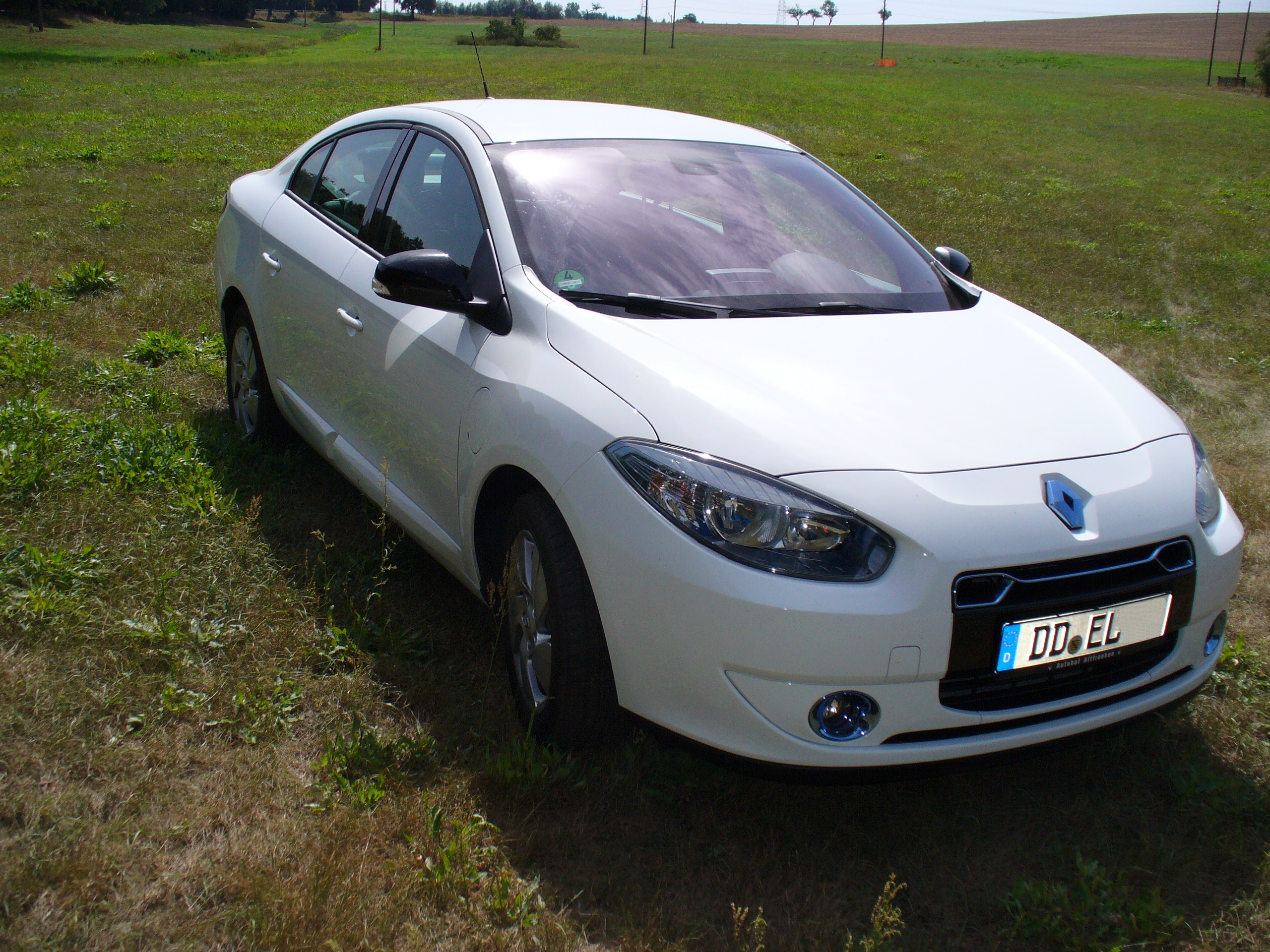 Renault Fluenze Z.E., Ansicht rechts-vorn